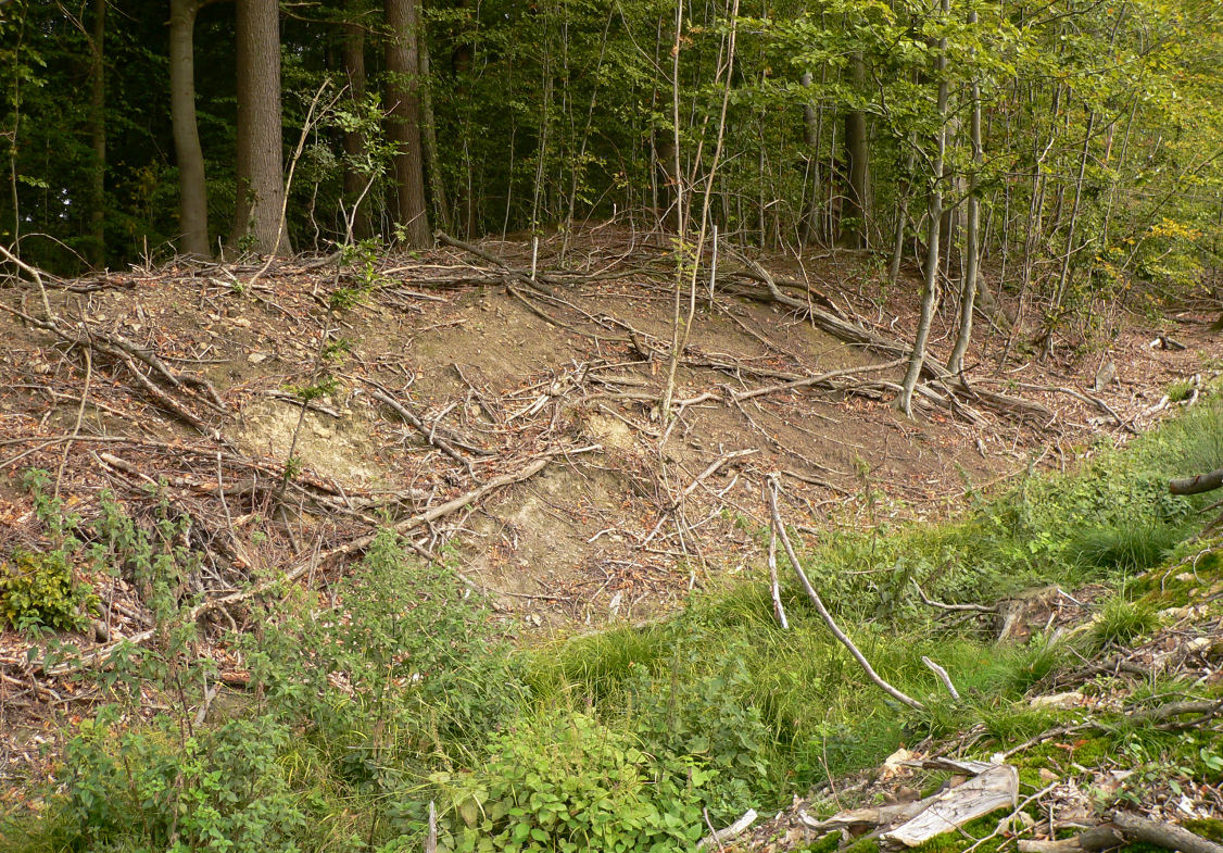 Heisterschlösschen